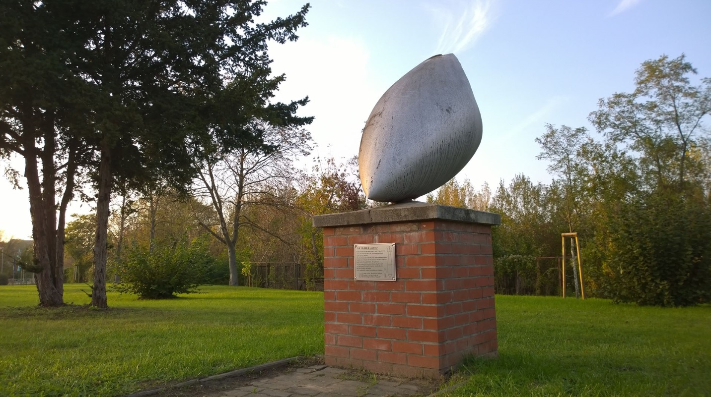 Originales Kopfstück einer englischen 5,4 t bunkerbrechenden und nach dem Erdbebenprinzip wirkenden D.P. 12000 lb Bombe (Tallboy).